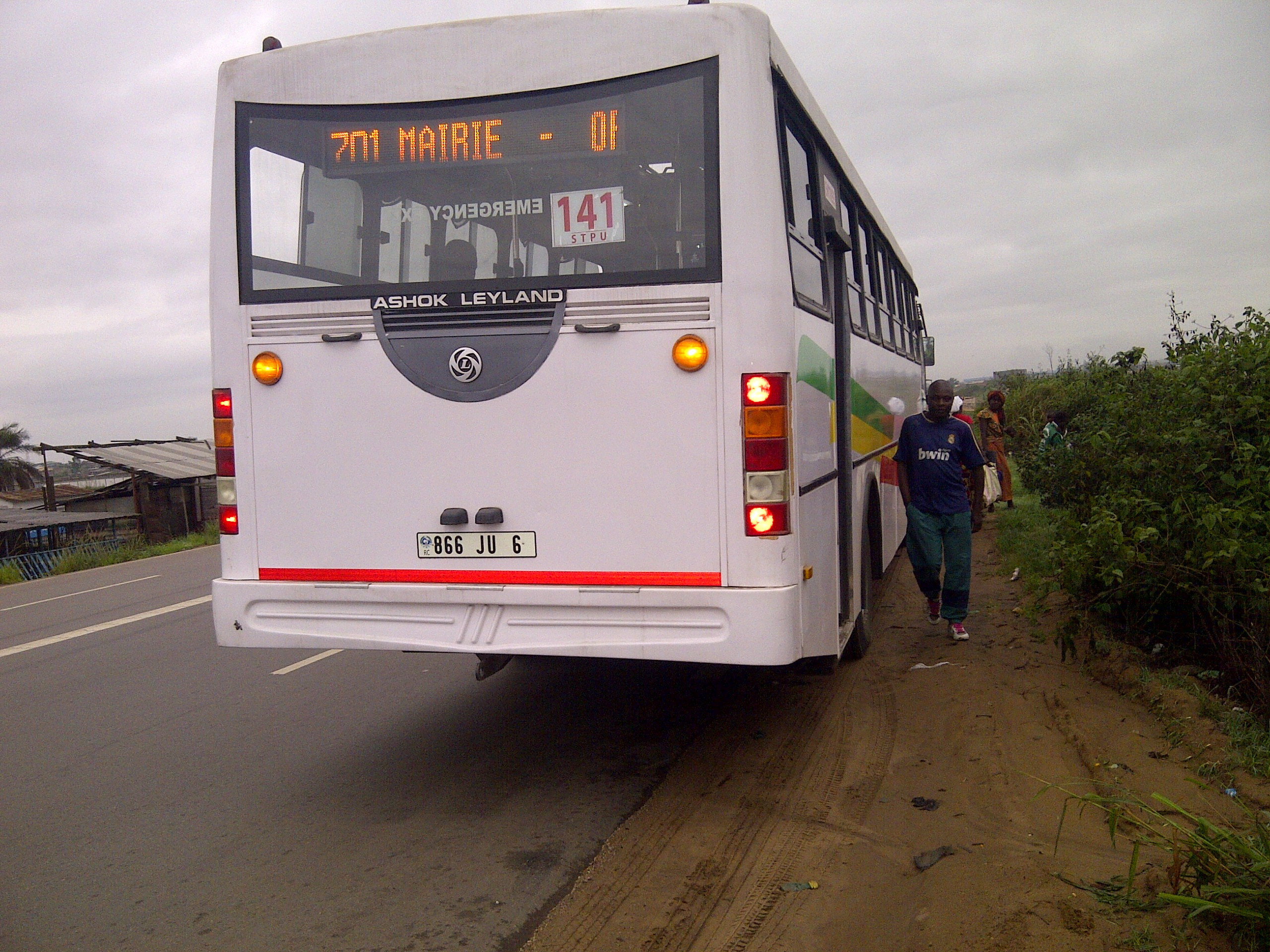 Ceci est une photo de l'arrière d'un bus de transport en commun de la ville de Pointe Noire au Congo Brazzaville This is an image with the theme "Africa on the Move or Transport" from: Congo